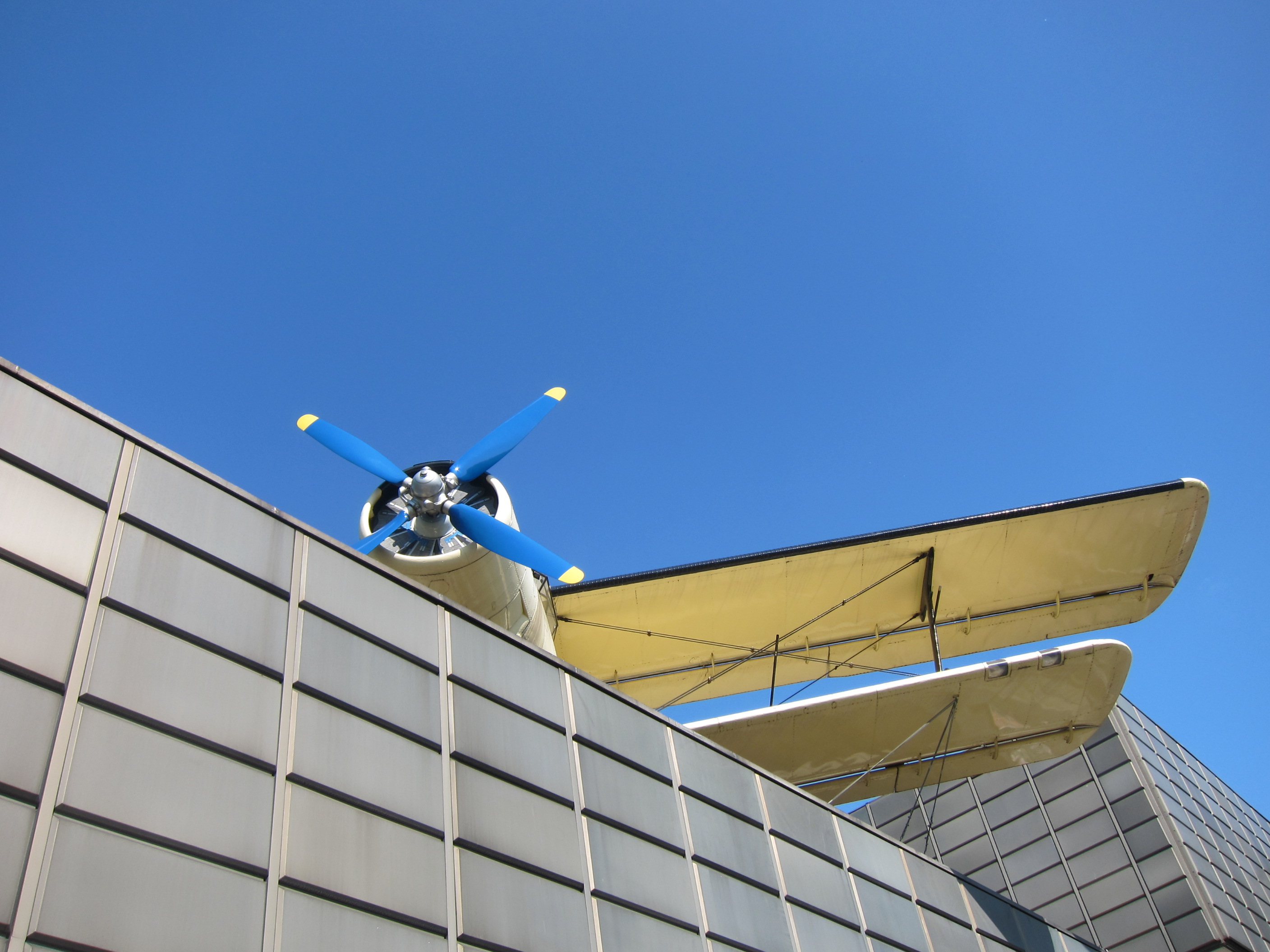 Музей на транспорта в Будапеща самолет